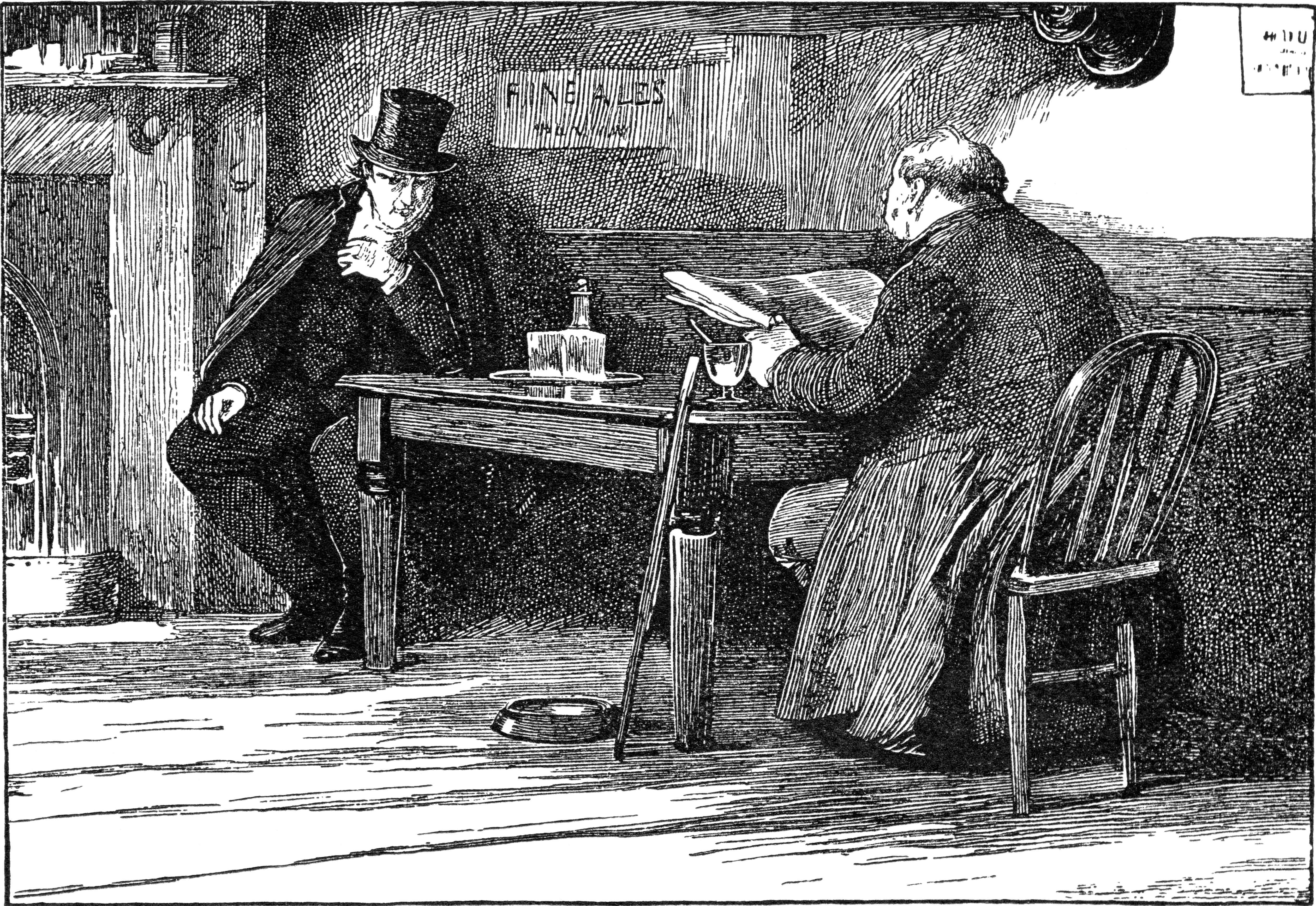 Illustration på sida 179 ur boken Oliver Twist: Samhällsroman från 1898